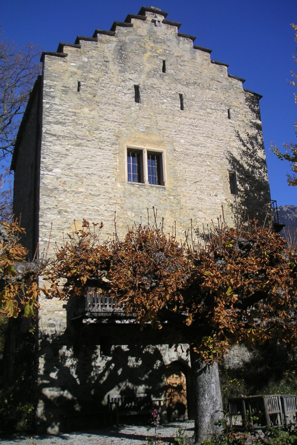 Tour moyenâgeuse "Muzot" à Veyras (Canton du Valais, Suisse) où Rainer Maria Rilke vécut avec son amie Elisabeth Dorothea Klossowska, dite Baladine, mère de Balthus, de 1921 à 1926.